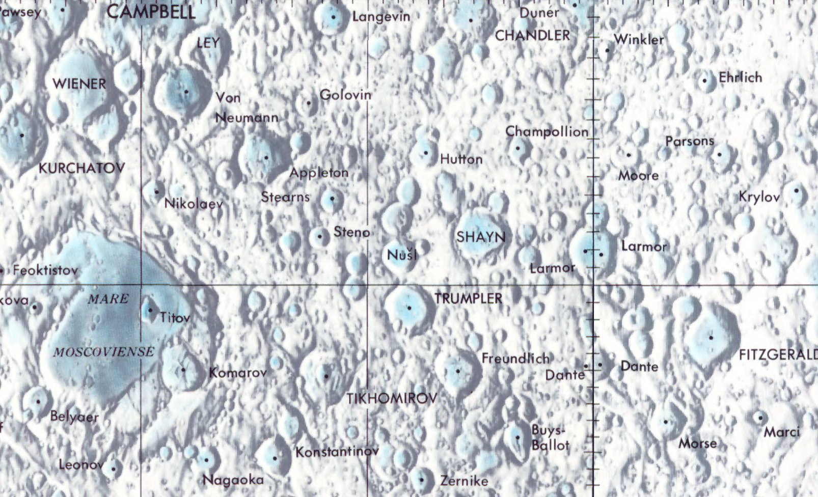 Cráter lunar Shayn. Localización. (Lunar Chart LPC1. Second Edition)